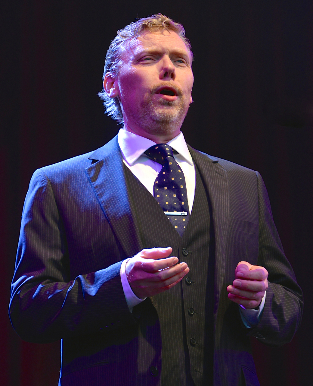 Karl-Magnus Fredriksson på en konsert på Gustav Adolfs torg under Stockholms Kulturfestival den 17 augusti 2013.